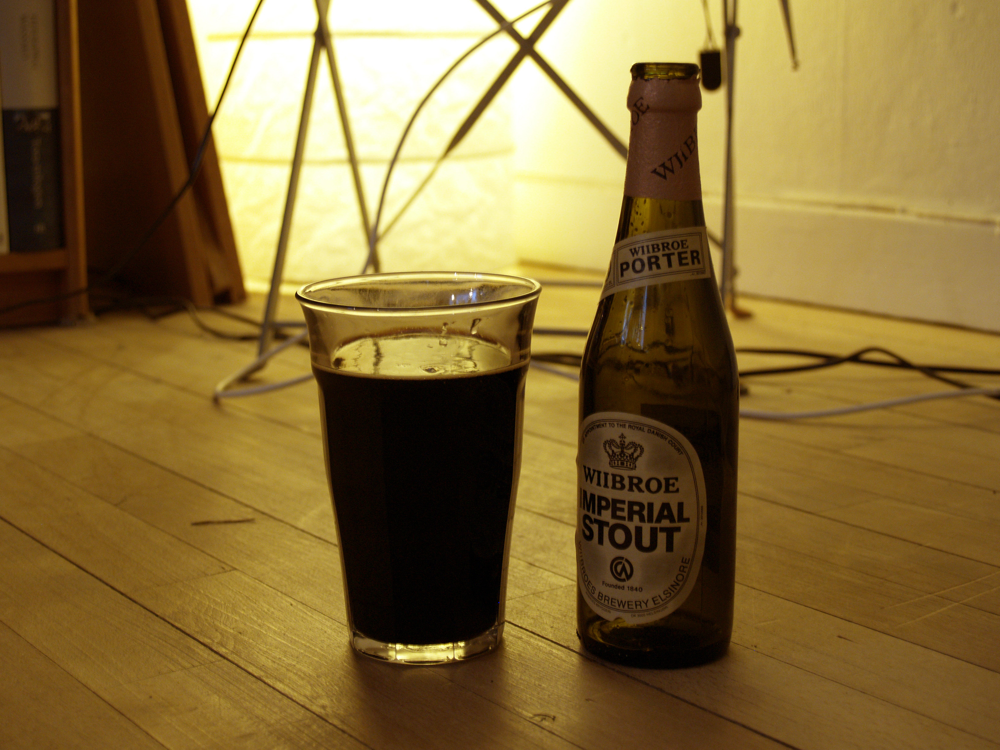 Imperial stout (Wiibroe porter)